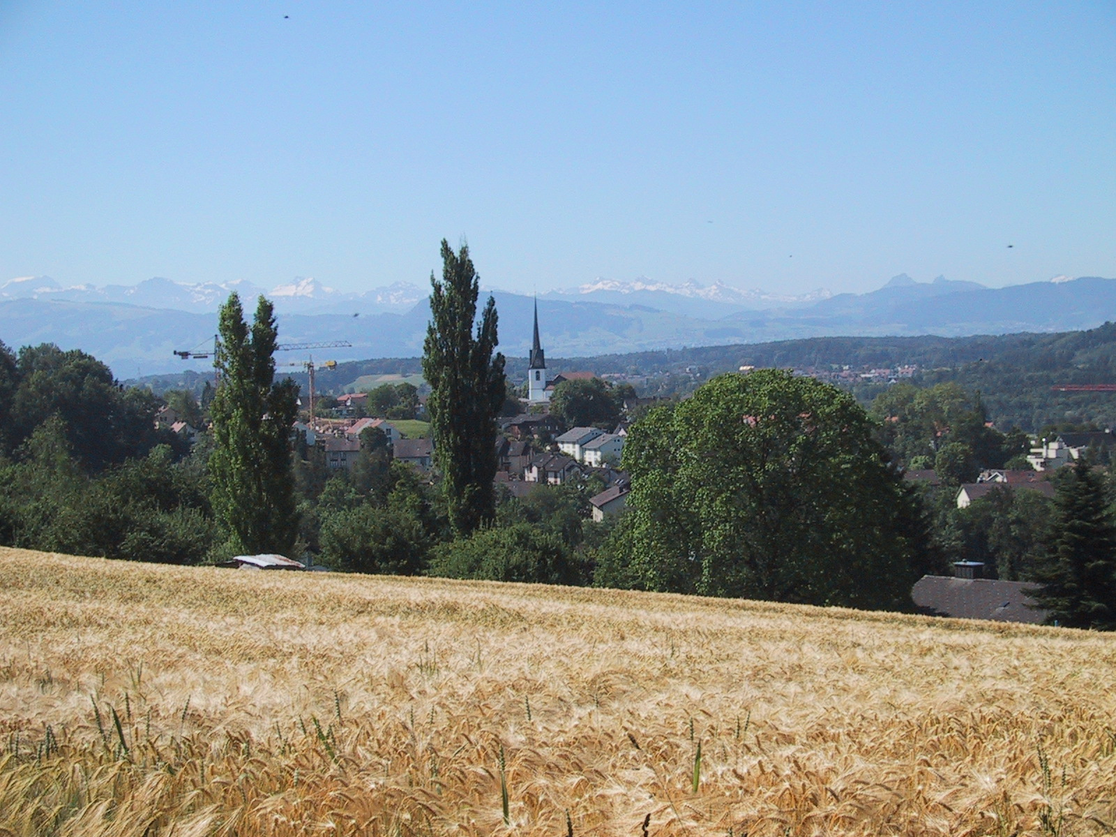 Blick auf das zürcherische Gossau ZH